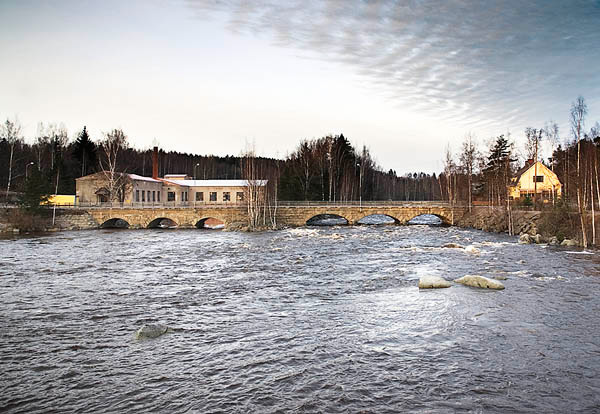 Siuronkoski alkukeväästä